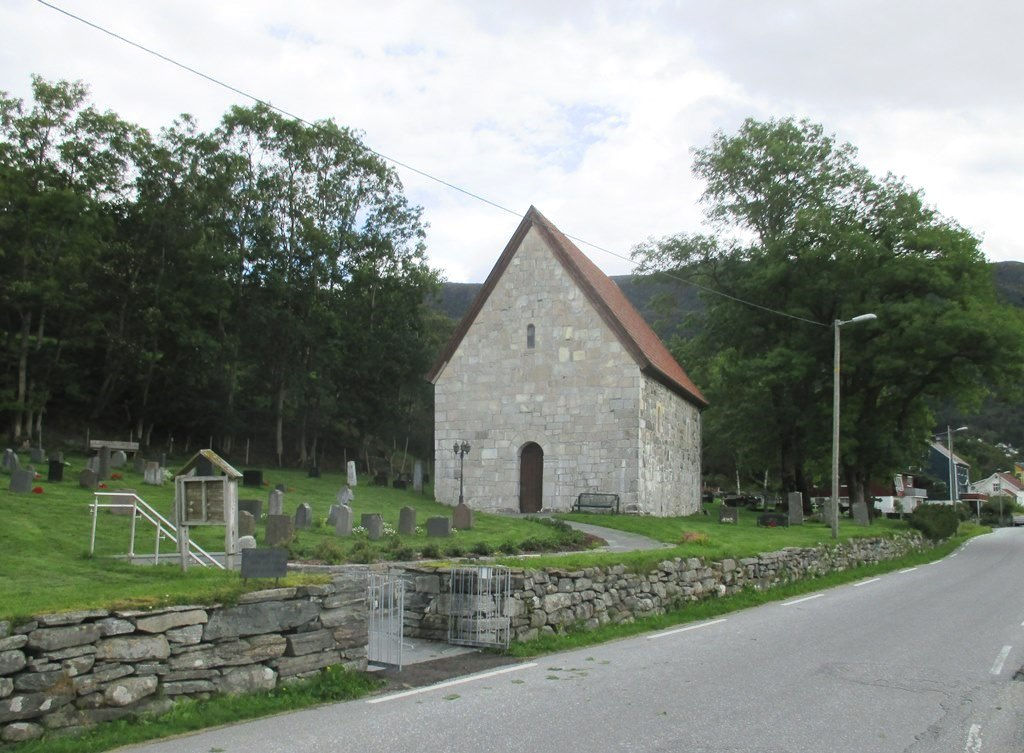 Fylkesvei 5 går forbi St. Jetmund kirke på Åheim.